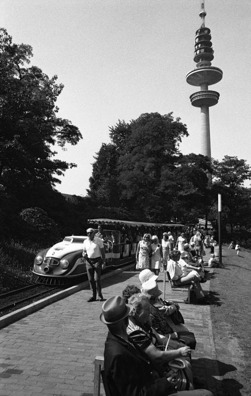 St.S. Hans Jürgen Rohr besucht die Internationale Gartenbau Ausstellung (IGA) in Hamburg